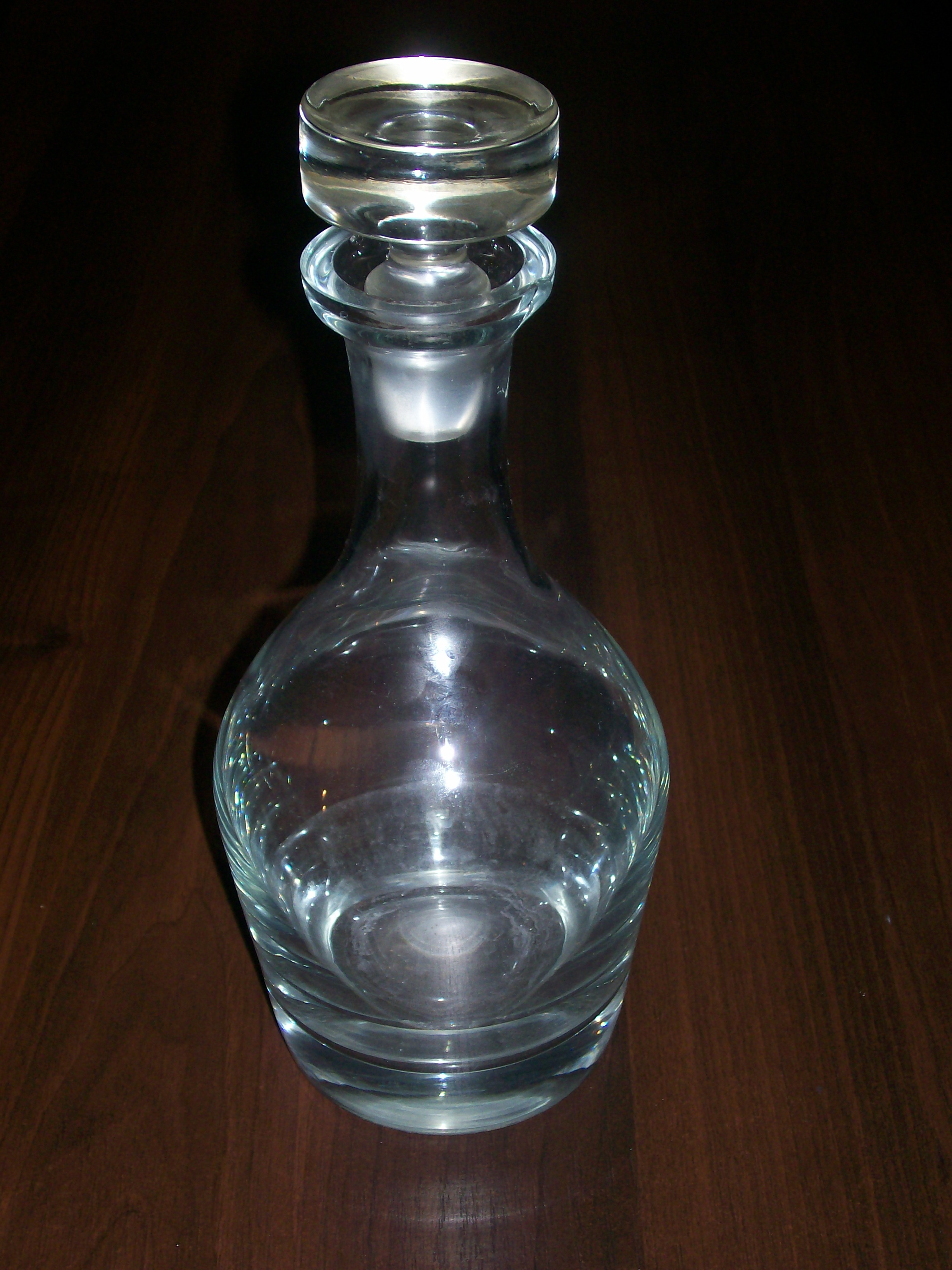 description:Karafka do przechowywania wina i wódki. author:Ewkaa